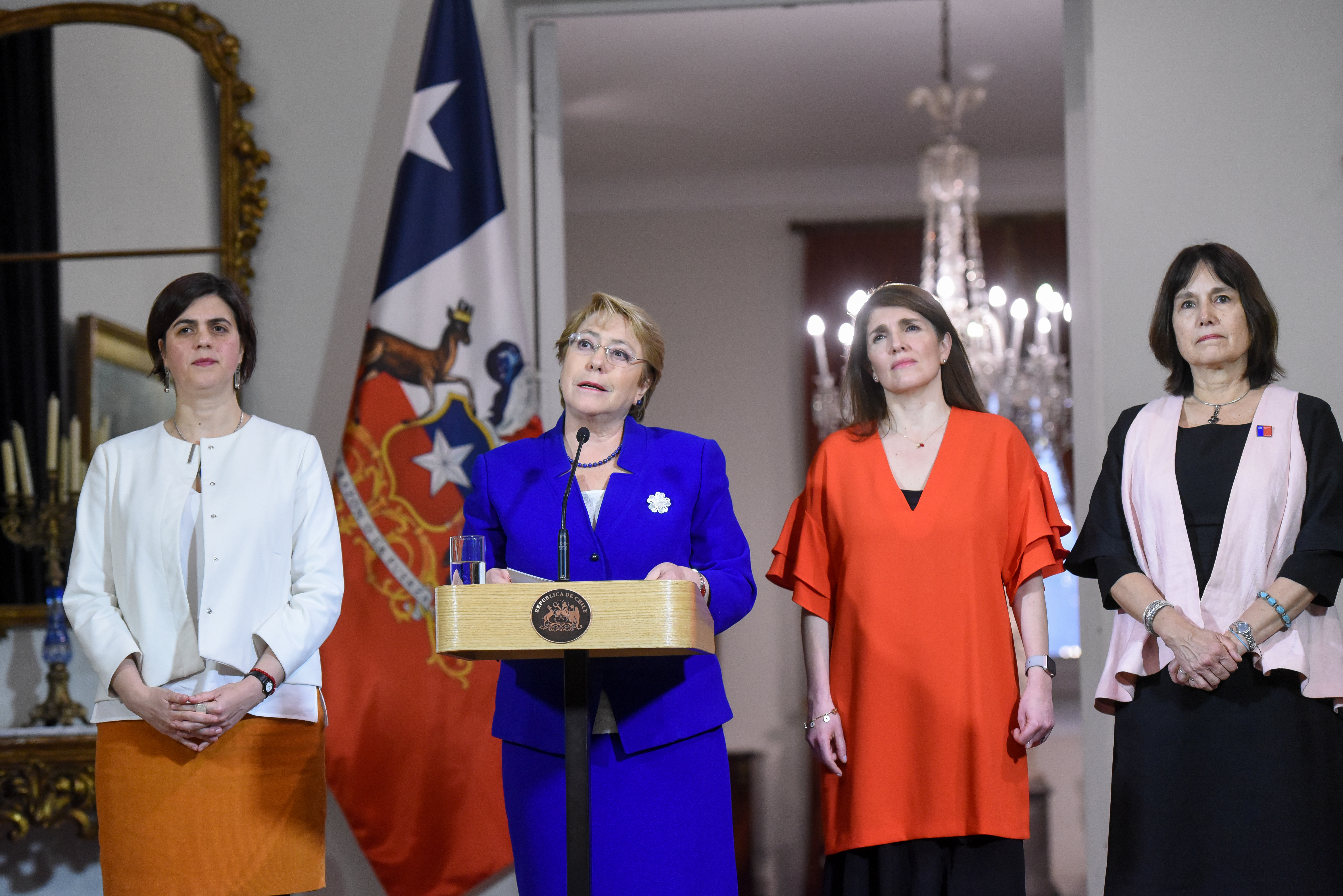 Presidenta Michelle Bachelet junto a las ministras Claudia Pascual, Paula Narváez y Carmen Castillo, se refiere al fallo del TC por despenalización de la interrupción voluntaria del embarazo en 3 causales.